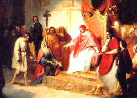 Enrico IV del Sacro Romano Impero innanzi Gregorio VII a Canossa. Fonte: it::en:Image:Canossa-three.jpg Note: L'autore è morto da oltre 100 anni